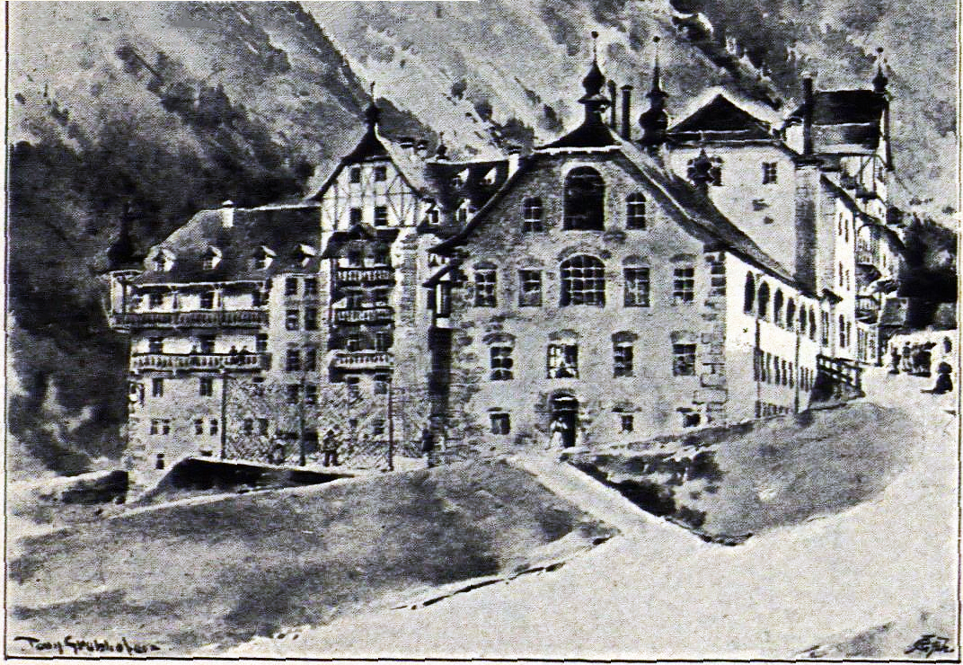 Grandhotel Trafoi (Architekt: Otto Schmid, 1857–1921; Bauherr: Verein für Alpenhotels (I. Ranges) in Tirol )